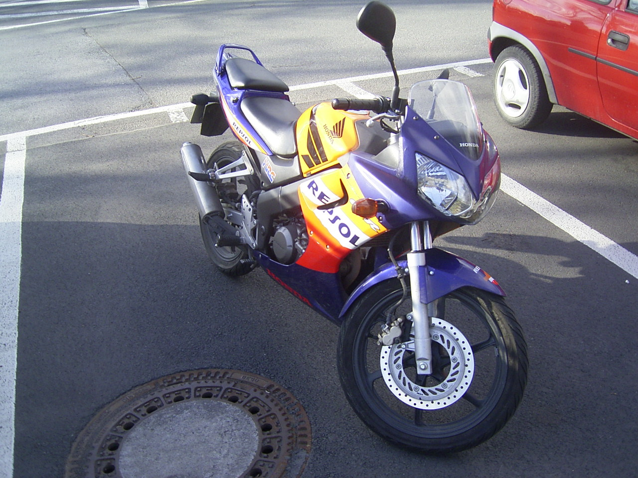 selbst fotografiert, Honda CBR125R, Lackierung:Repsol